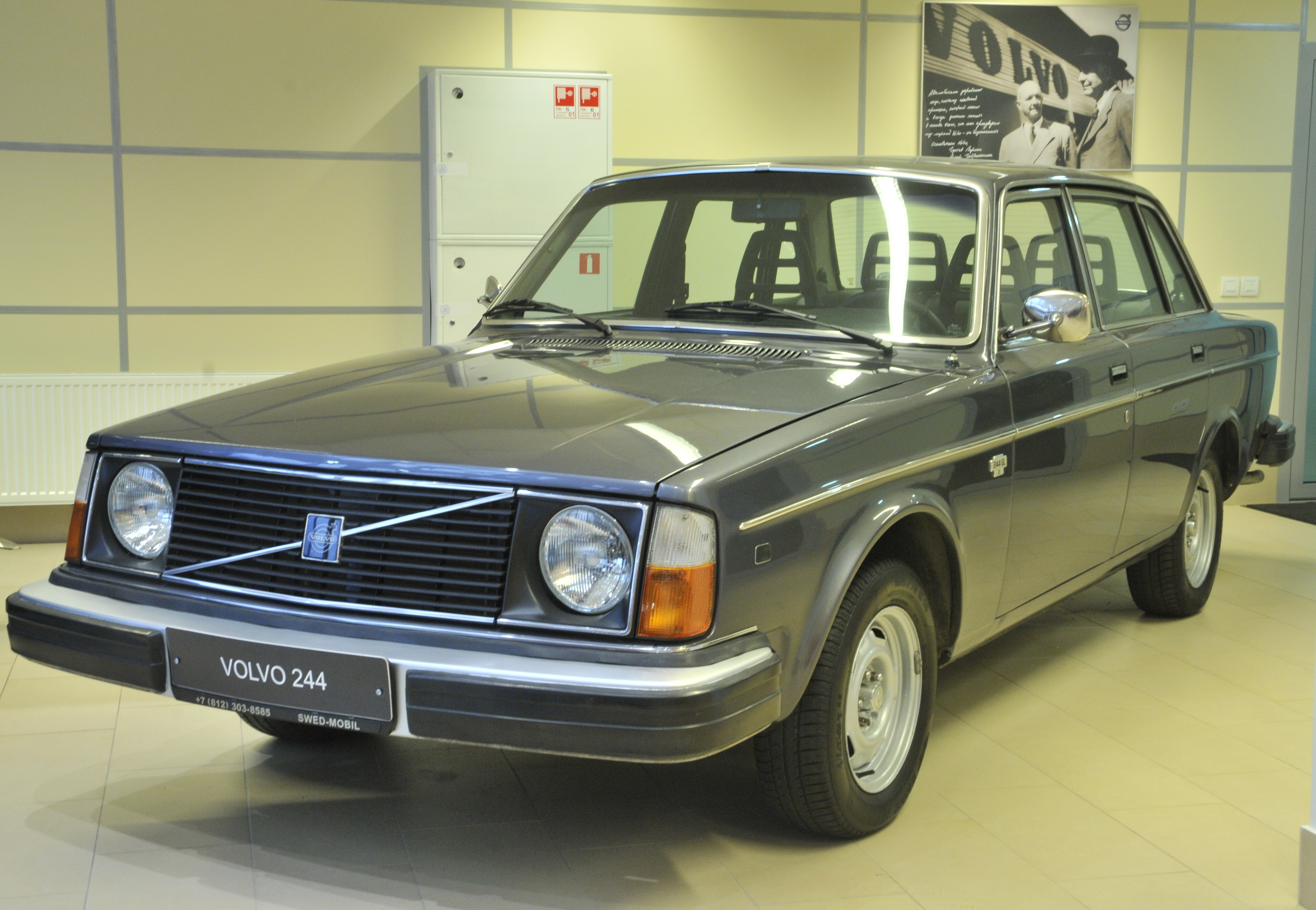 Volvo_244_в_Свид-Мобиль